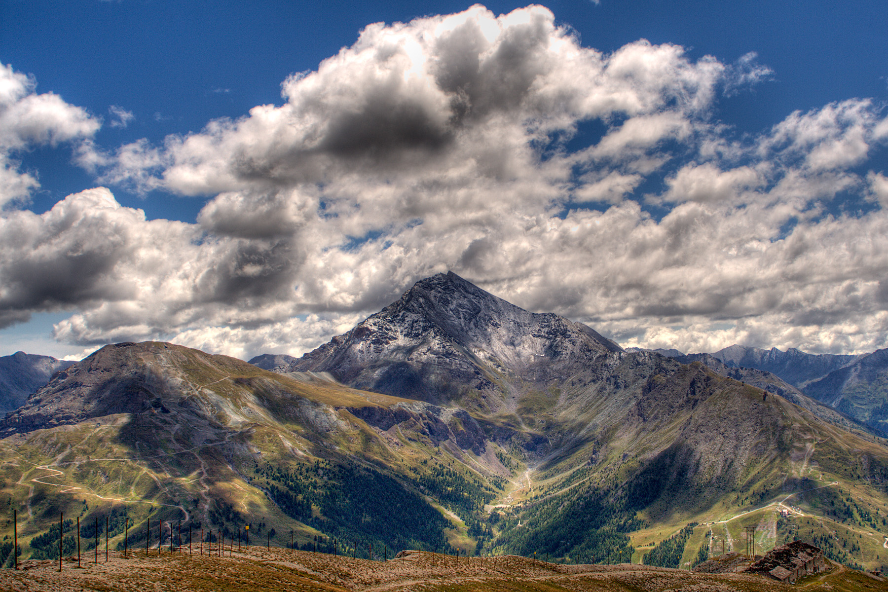 Panorama da Cima Fraiteve (2689 m)